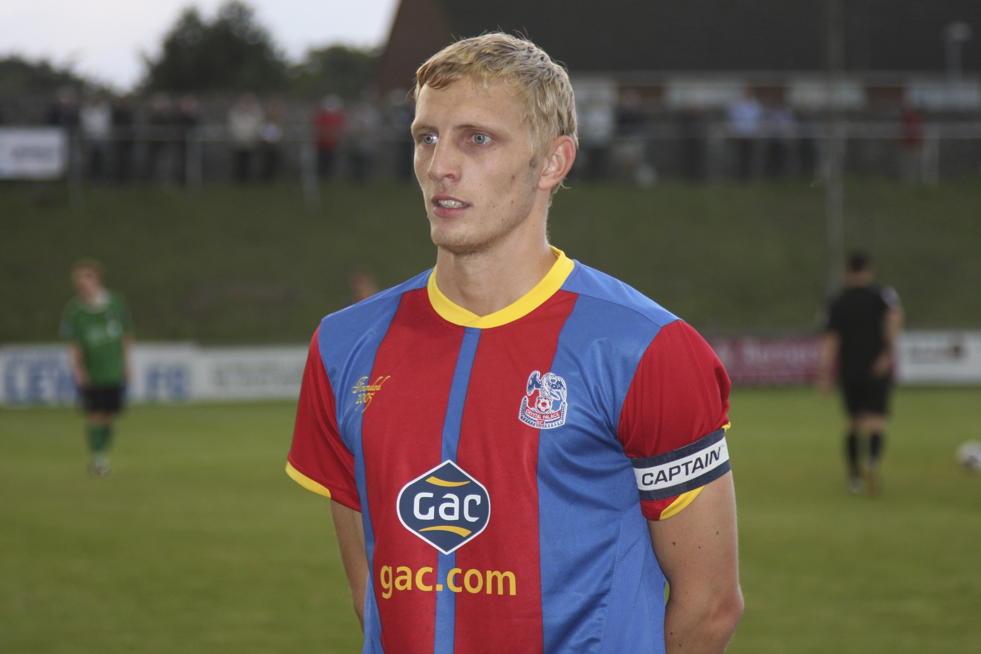 Dean Moxey (NOT Paddy McCarthy)